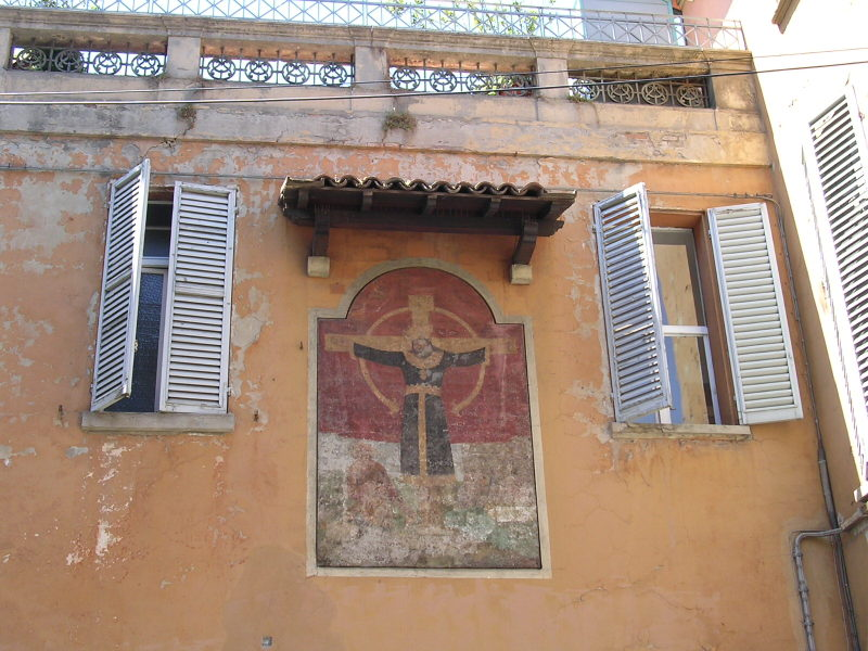 Affresco del Volto Santo di Lucca in via Valdaposa a Bologna.